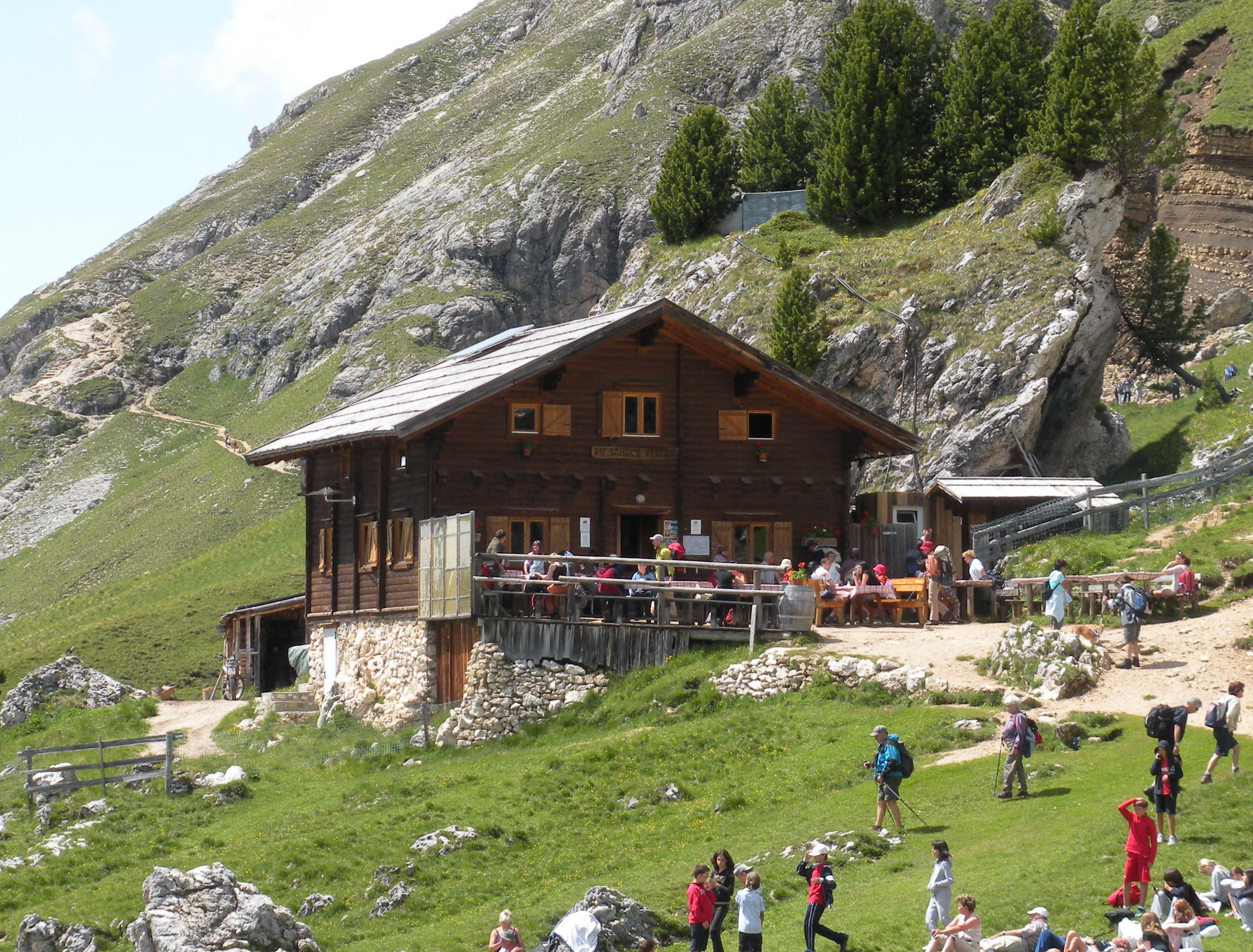 Rifugio Sandro Pertini (Gruppo Sassolungo, Dolomiti) Foto propria Luglio 2009